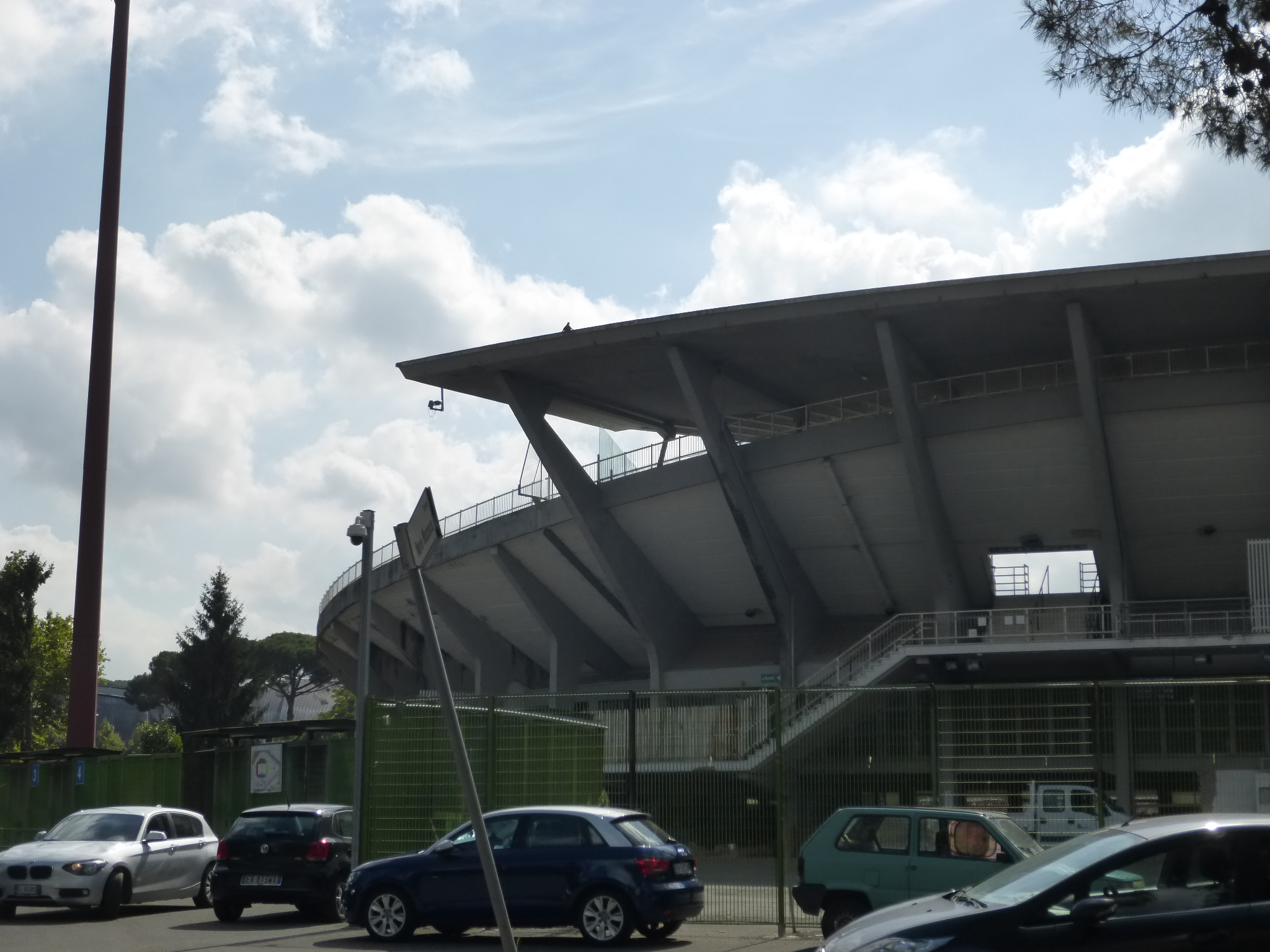 Roma, viale Tiziano, stadio Flaminio